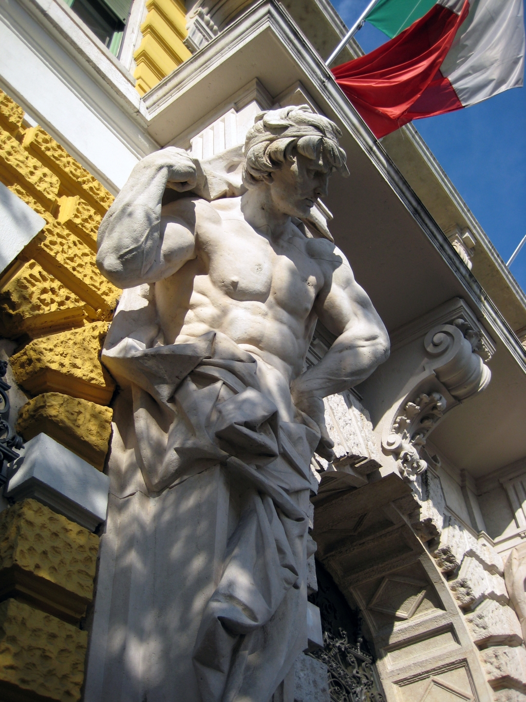 detalj na ulazu u zgradu Jadrolinije